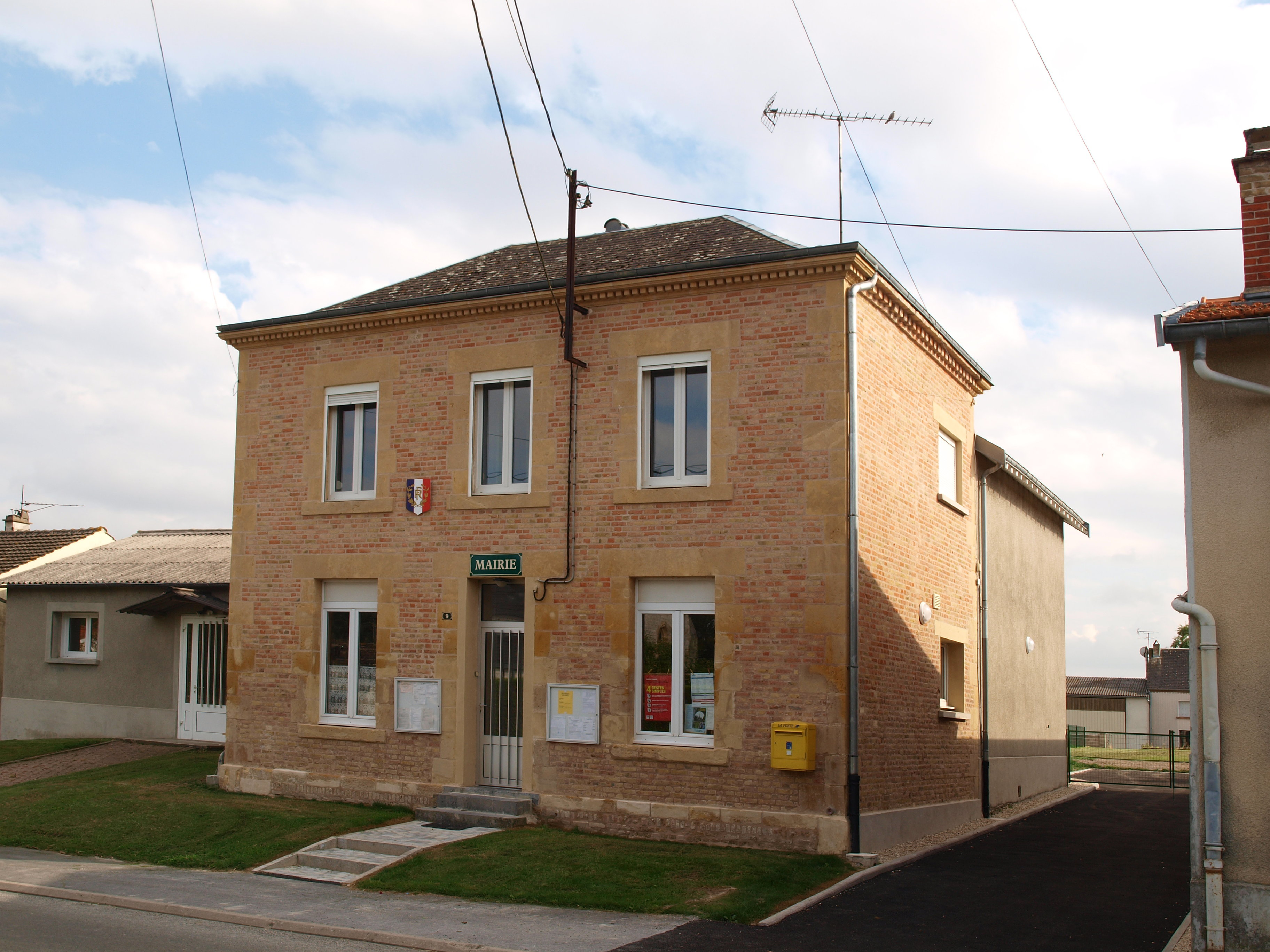 Saint-Pierre-à-Arnes (Ardennes, France) ; mairie